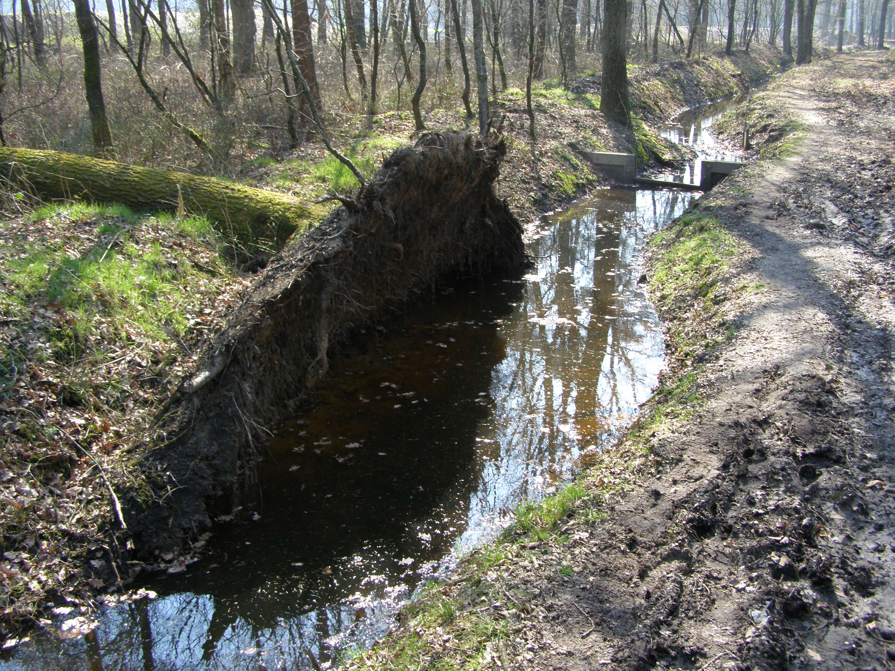 eigen werk